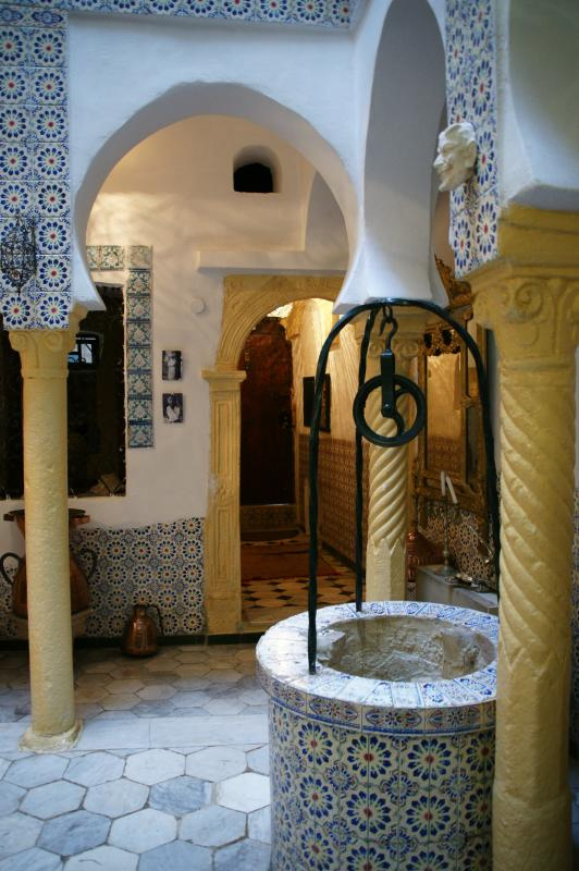 Puit intérieur, casbah d'Alger.